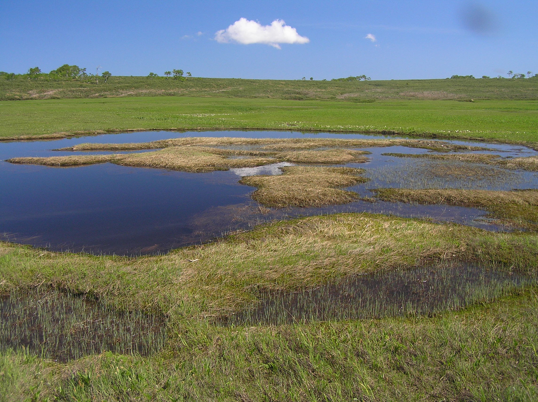 北海道雨竜沼池塘